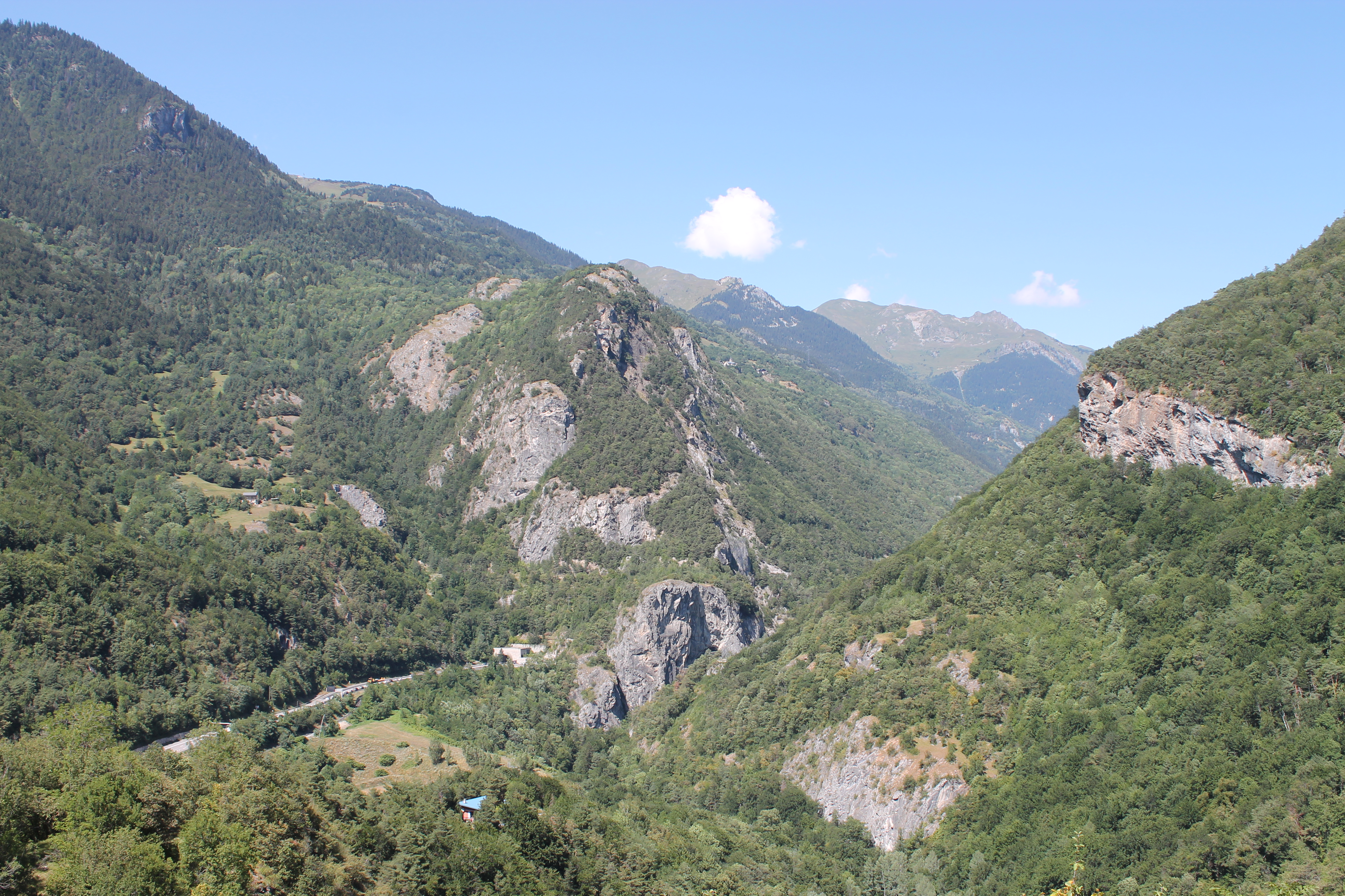 Étroit du Siaix depuis le Roc Puppin (2019).